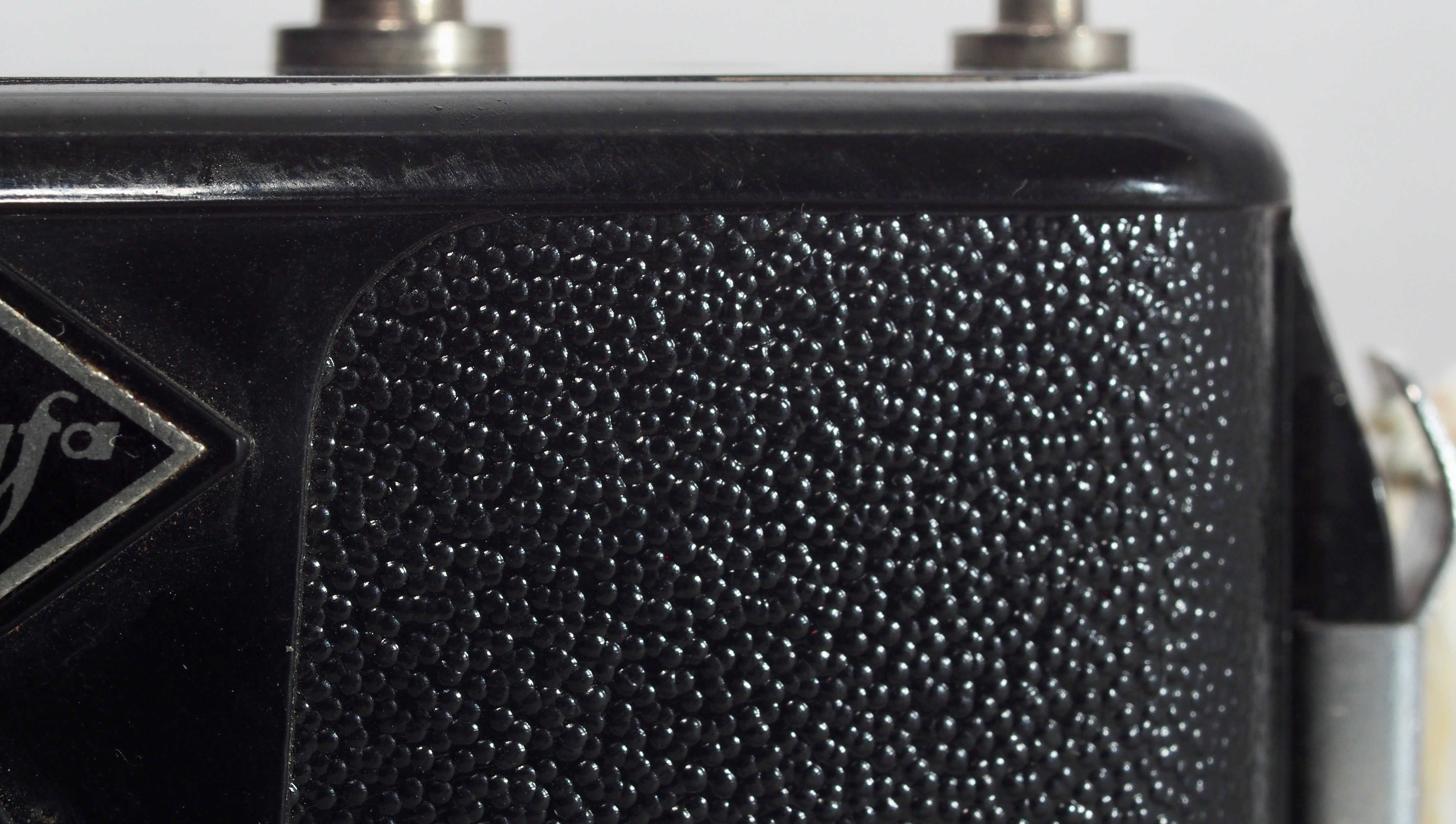 Click Oberfläche geprägt